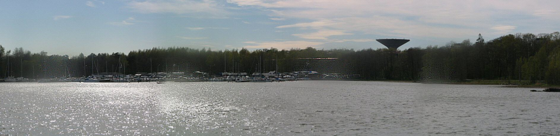 Strömsinlahti Marjaniemen suunnasta nähtynä. Taustalla Roihuvuori ja Roihuvuoren vesitorni.